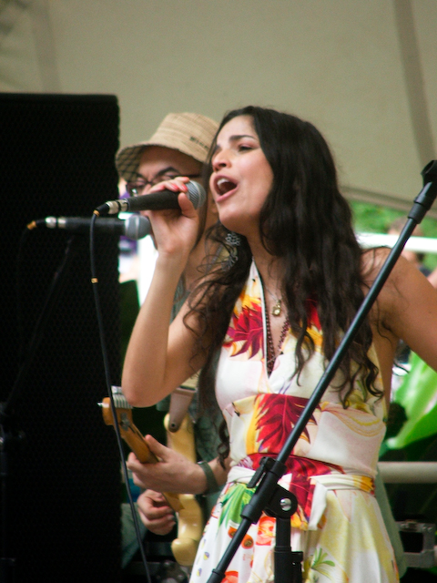 Banda Moinho - Música no Parque - 24/08/2008